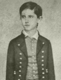 Petőfi Zoltán magyar színész, költő.